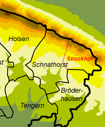 Karte von Struckhof